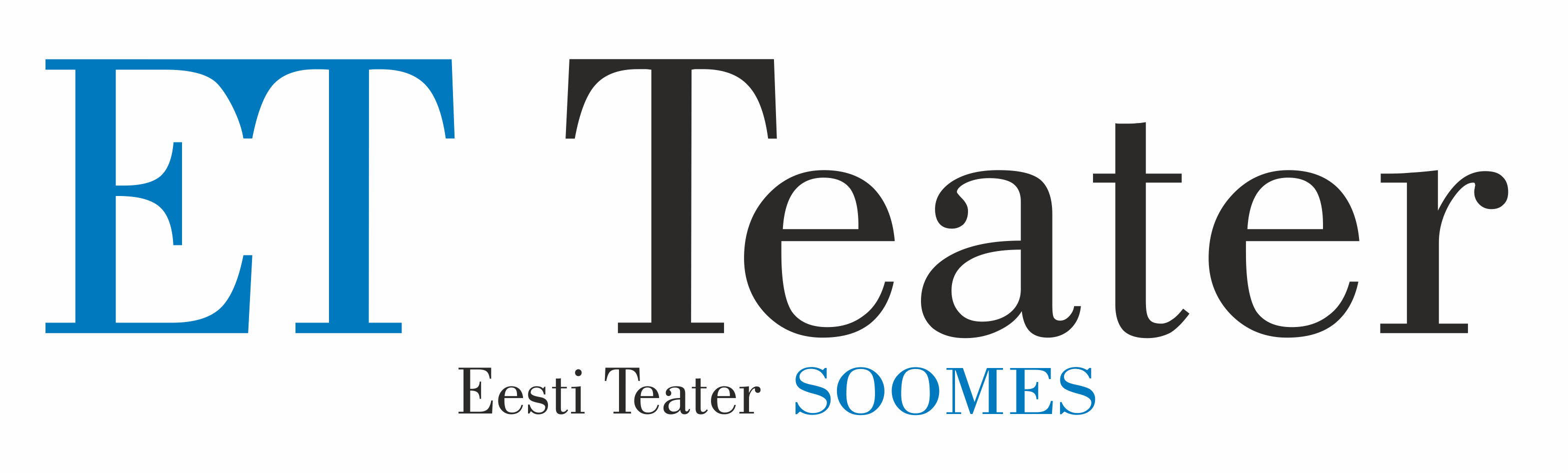 Soome eestlaste teater ET Teater logo